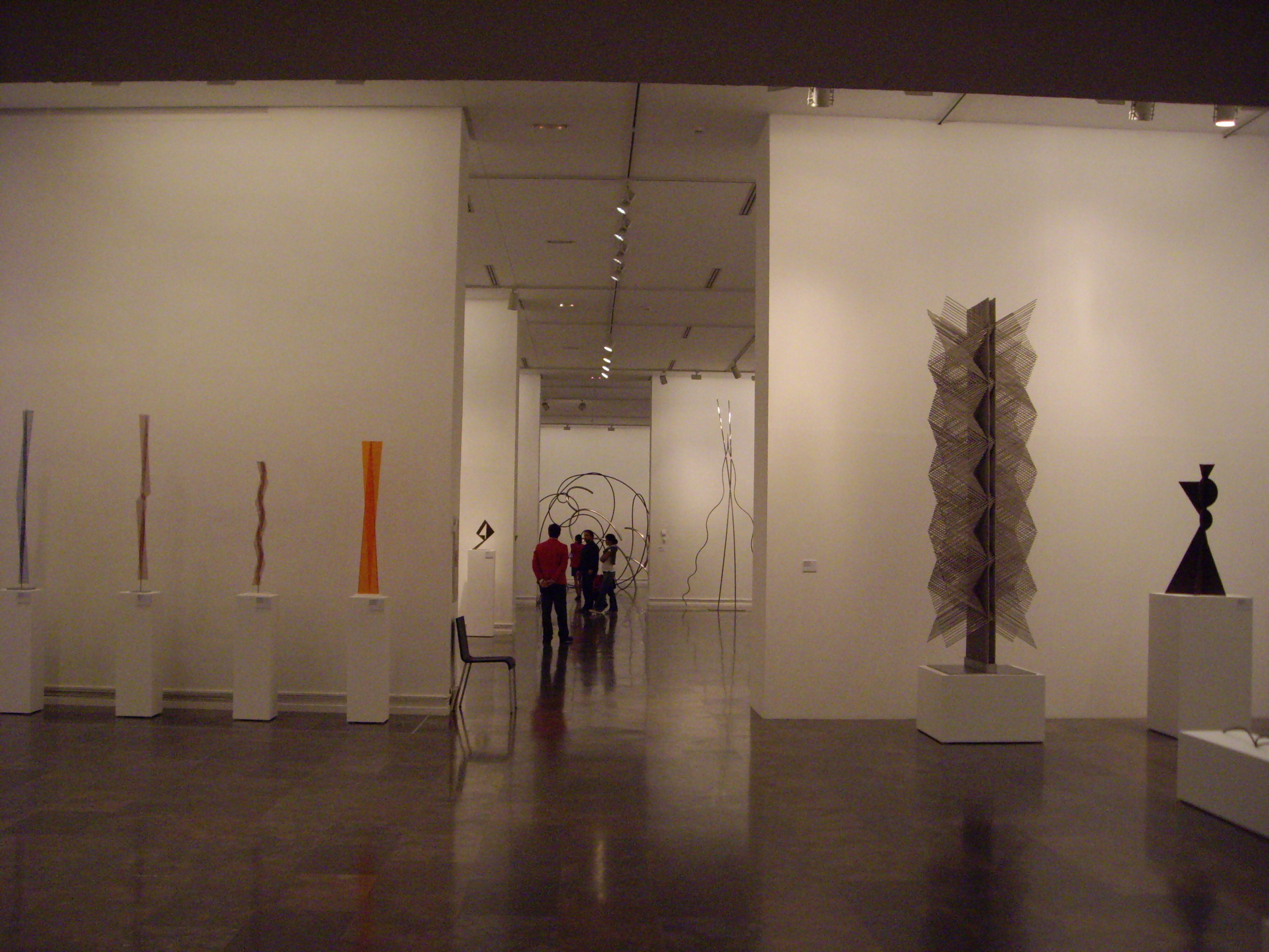 Sala de l'IVAM durant una exposició dedicada a Andreu Alfaro